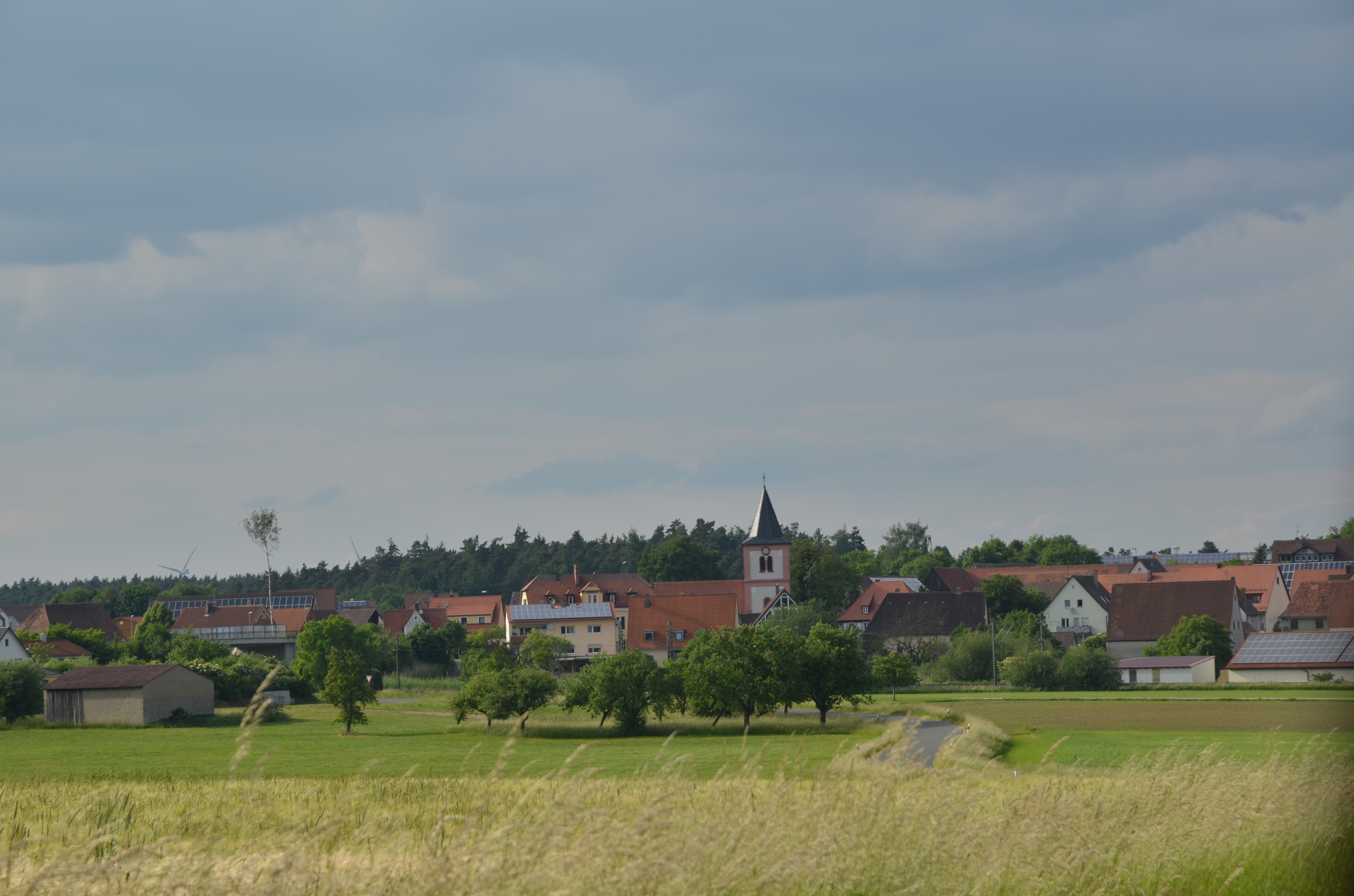 Hagenbüchach mit der Kirche St. Kilian